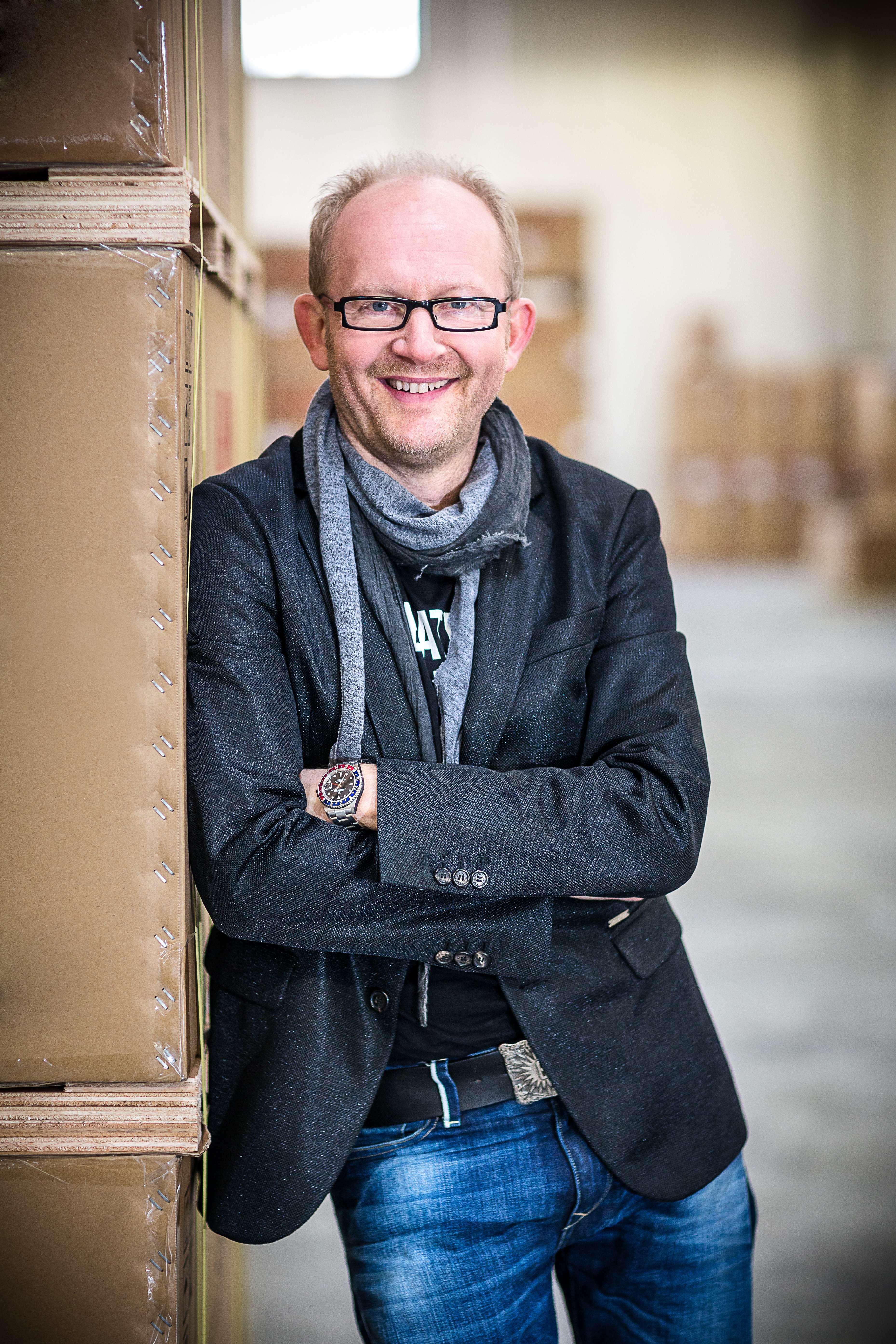 Dieter Falk 2014